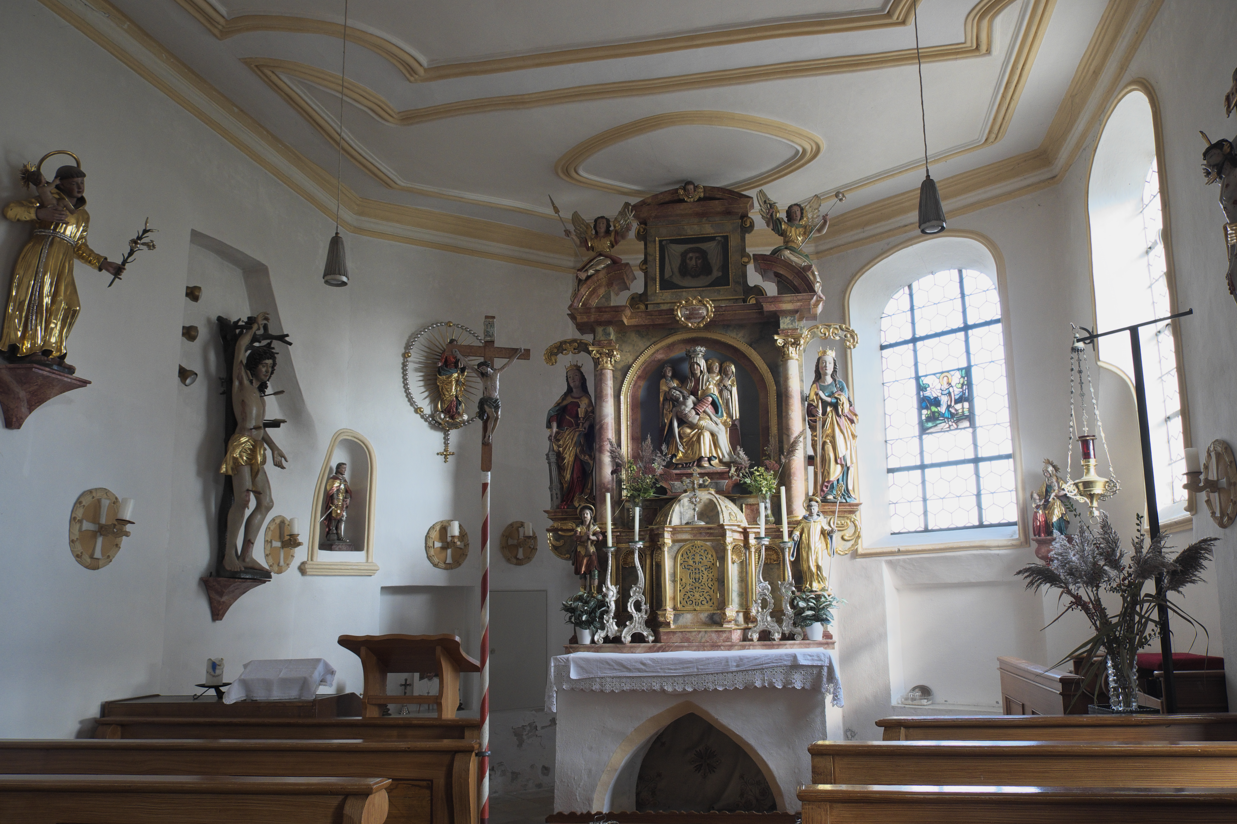 Katholische Filialkirche Unsere Liebe Frau in Machtenstein (Schwabhausen) im Landkreis Dachau (Bayern/Deutschland), Innenraum